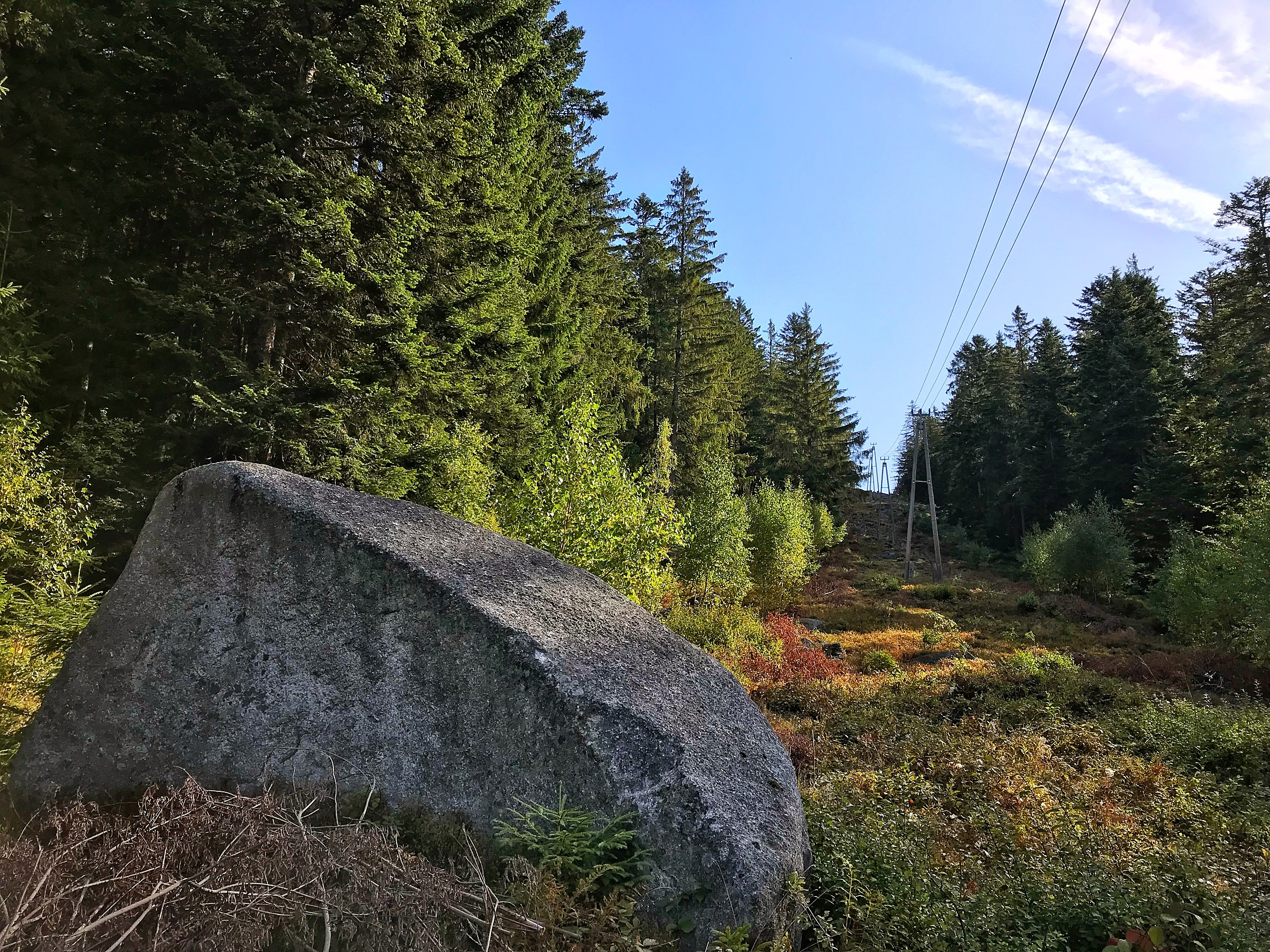 Spálený (1013 m) na Šumavě